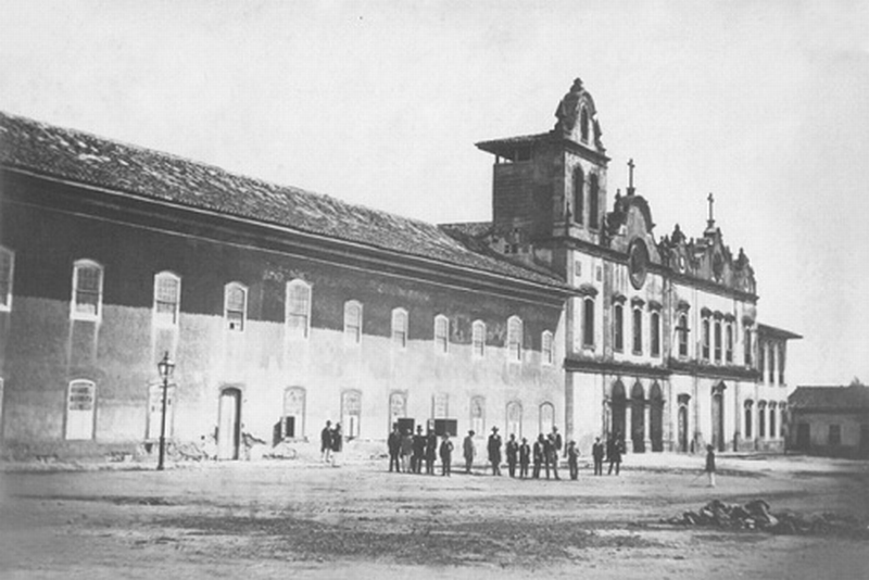 Fotografia da Faculdade de Direito do Largo de São Francisco - São Paulo - Brasil, cerca de 1860.